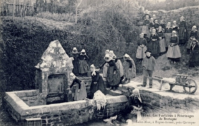 Ergué-Armel : pèlerinage à la fontaine Saint-Alor au début du XXe siècle (carte postale Villard)